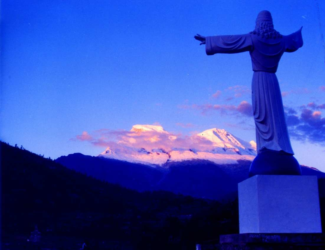 Esta foto fue tomada desde la cima del cementerio de Yungay- Peru, a las 18:00 Hrs del 28 de julio del 2006